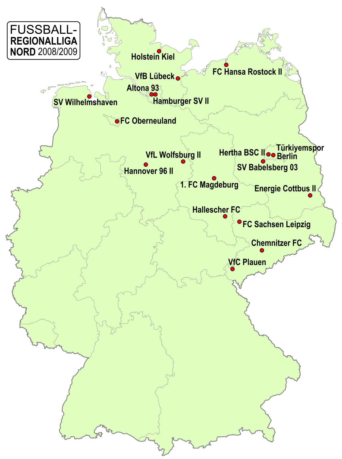 Karte der Vereine der Fußball-Reginalliga Nord, Saison 2008/2009